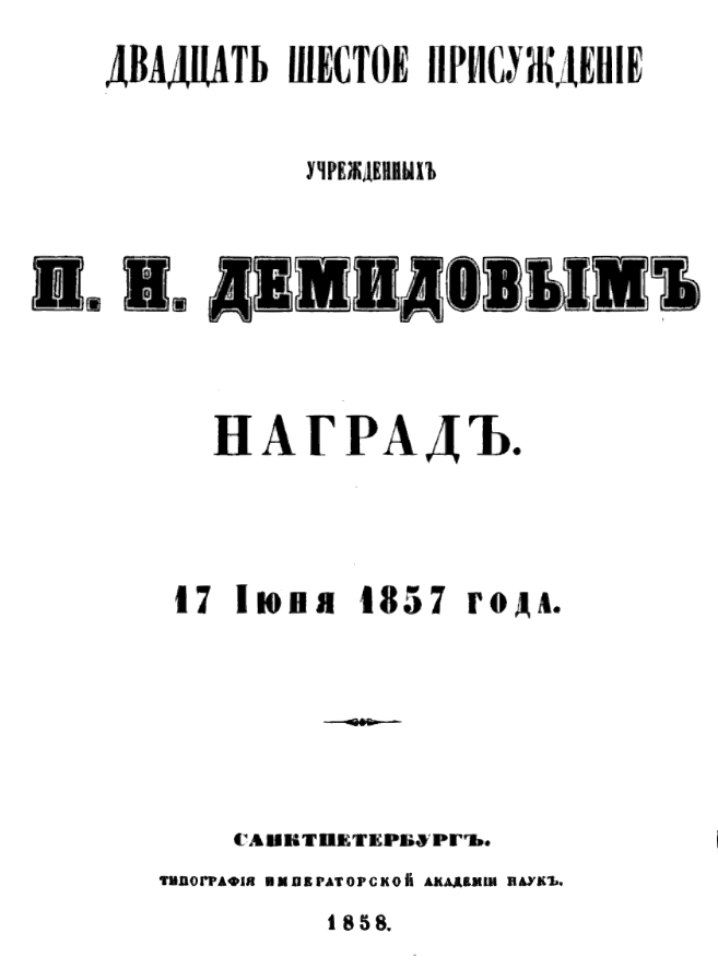 Двадцать шестое присуждение учрежденных П.Н. Демидовым наград, 17 июня 1857 г. СПб. ИАН, 1858.